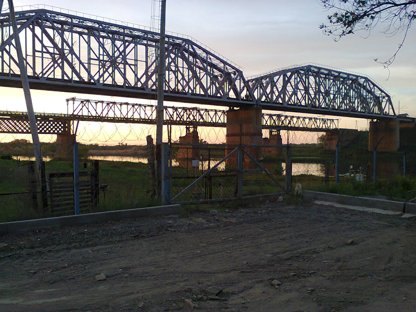 Каменск-Шахтинский, ЖД и гужевой мосты.